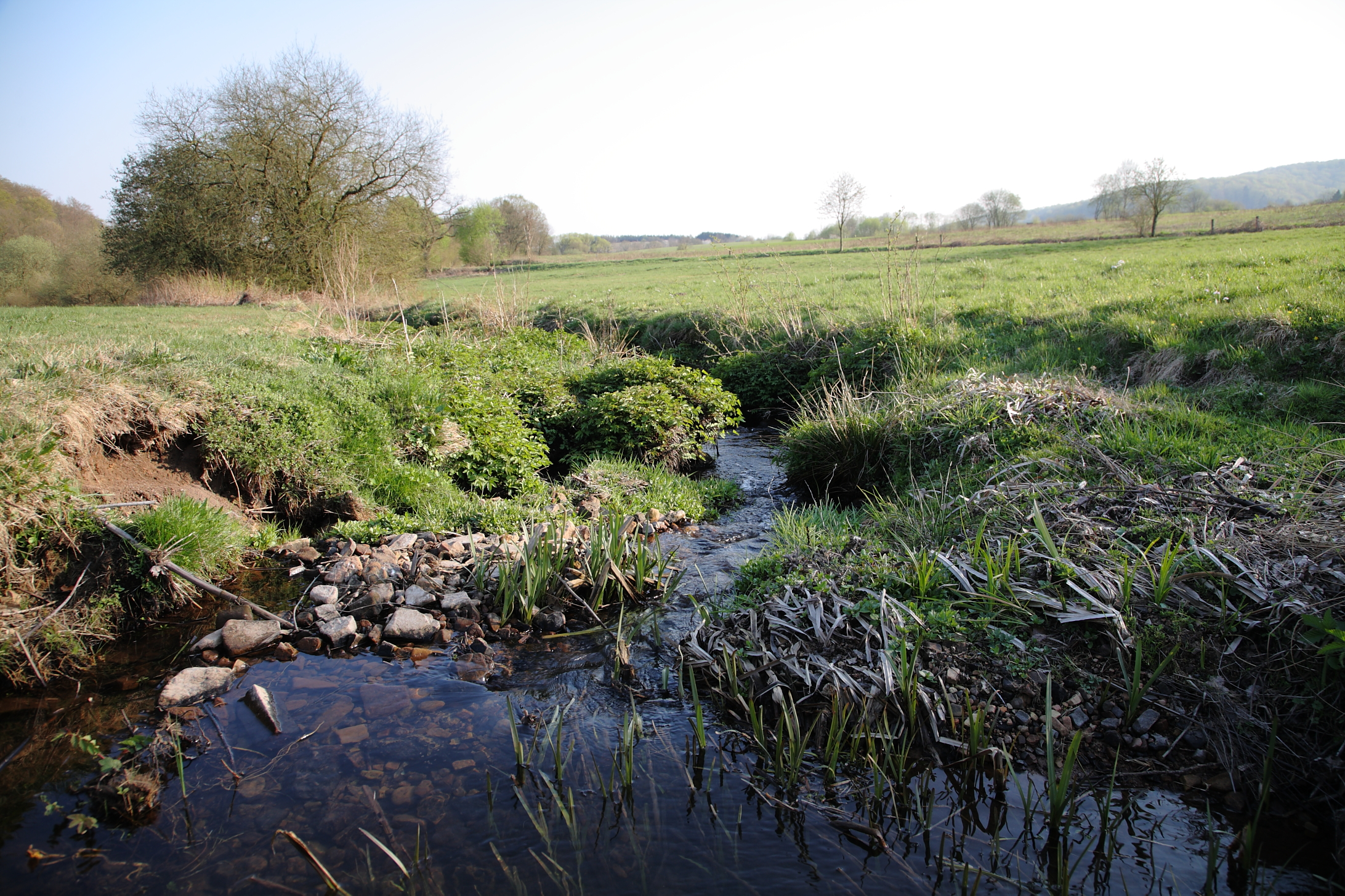 Der Rehbach am Rande der Wünstung Röbbeck